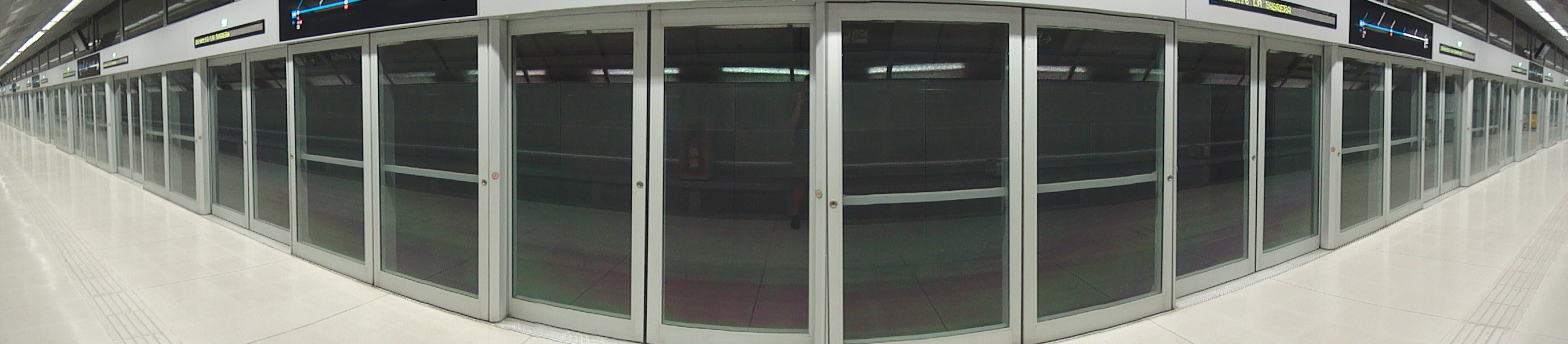 Vista panoràmica de les portes de seguretat (L9-L10)